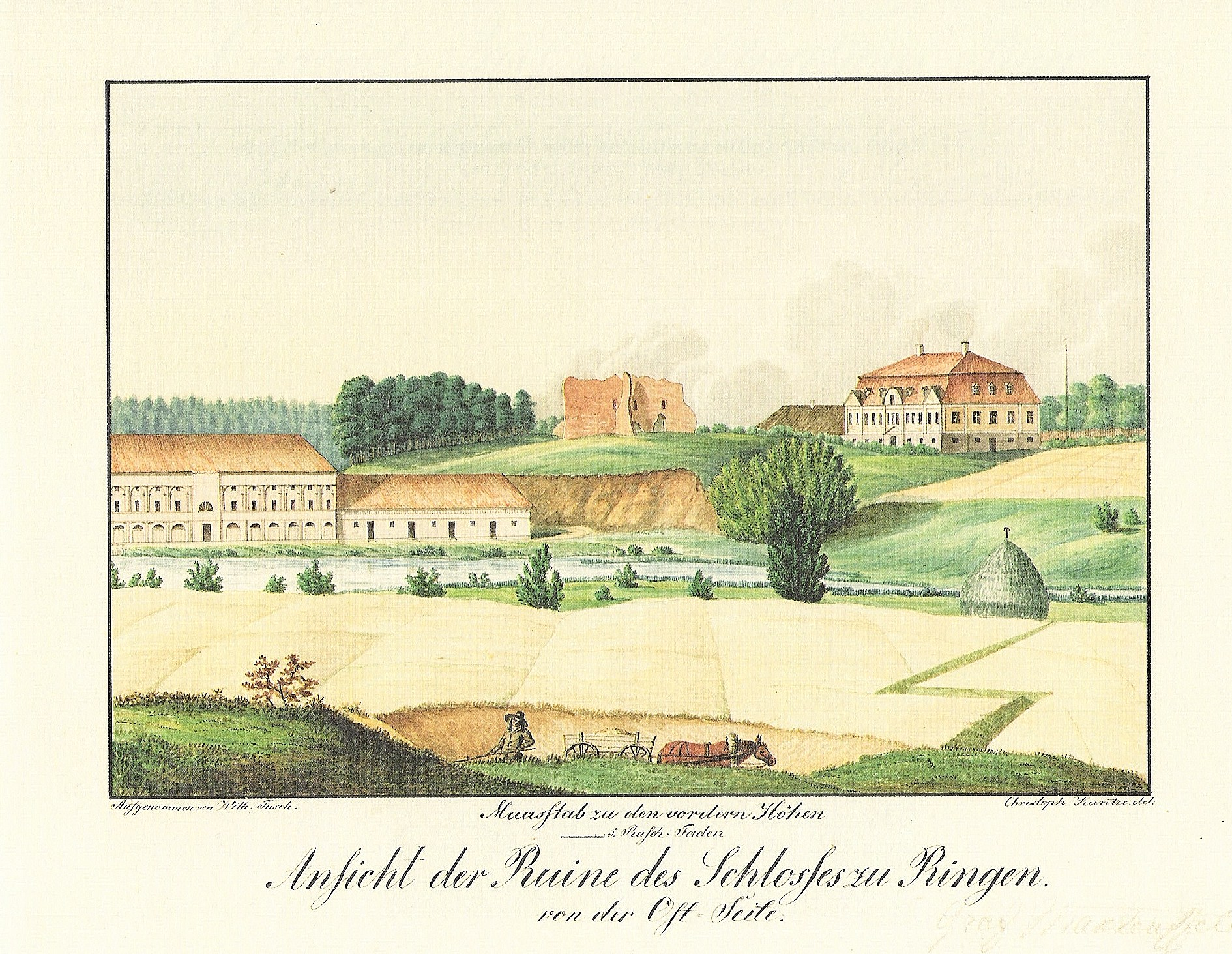 Rõngu linnuse varemed